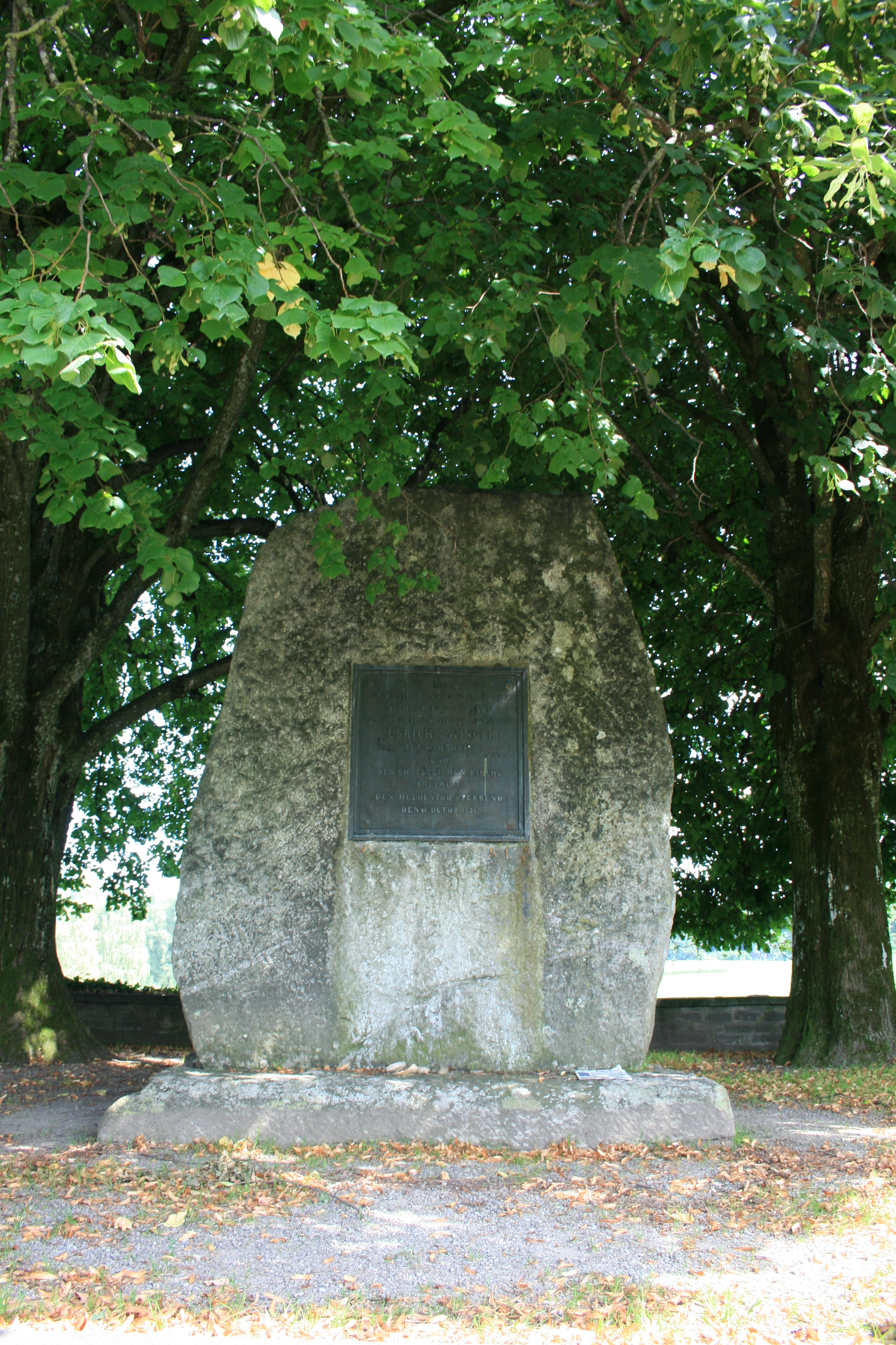 Denkmal für Ulrich Zwingli in Kappel am Albis, Schweiz